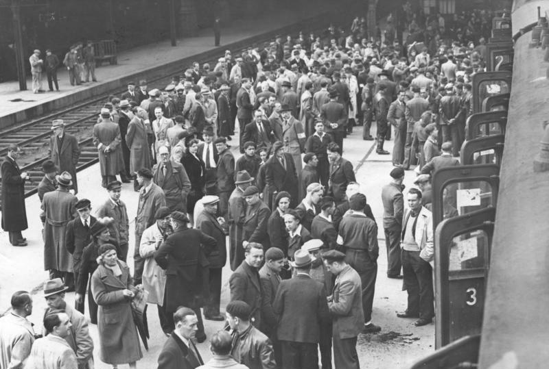 ADN-ZB-Archiv II. Weltkrieg 1939-45 Frankreich während der Besetzung durch die deutschen Faschisten UBz: Ehemalige Kriegsgefangene, die zur Arbeit in der Rüstungsindustrie in Deutschland verpflichtet wurden, vor der Abfahrt [auf einem Bahnhof]; April 1943. 2826-43 Scherl Bilderdienst, Fulgur